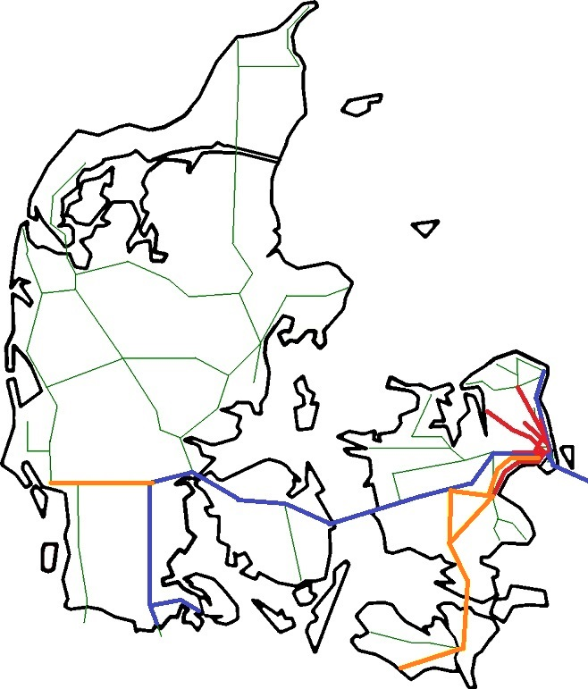 En bedre skitse over de strækninger som det allerede er besluttet at elektrificere.